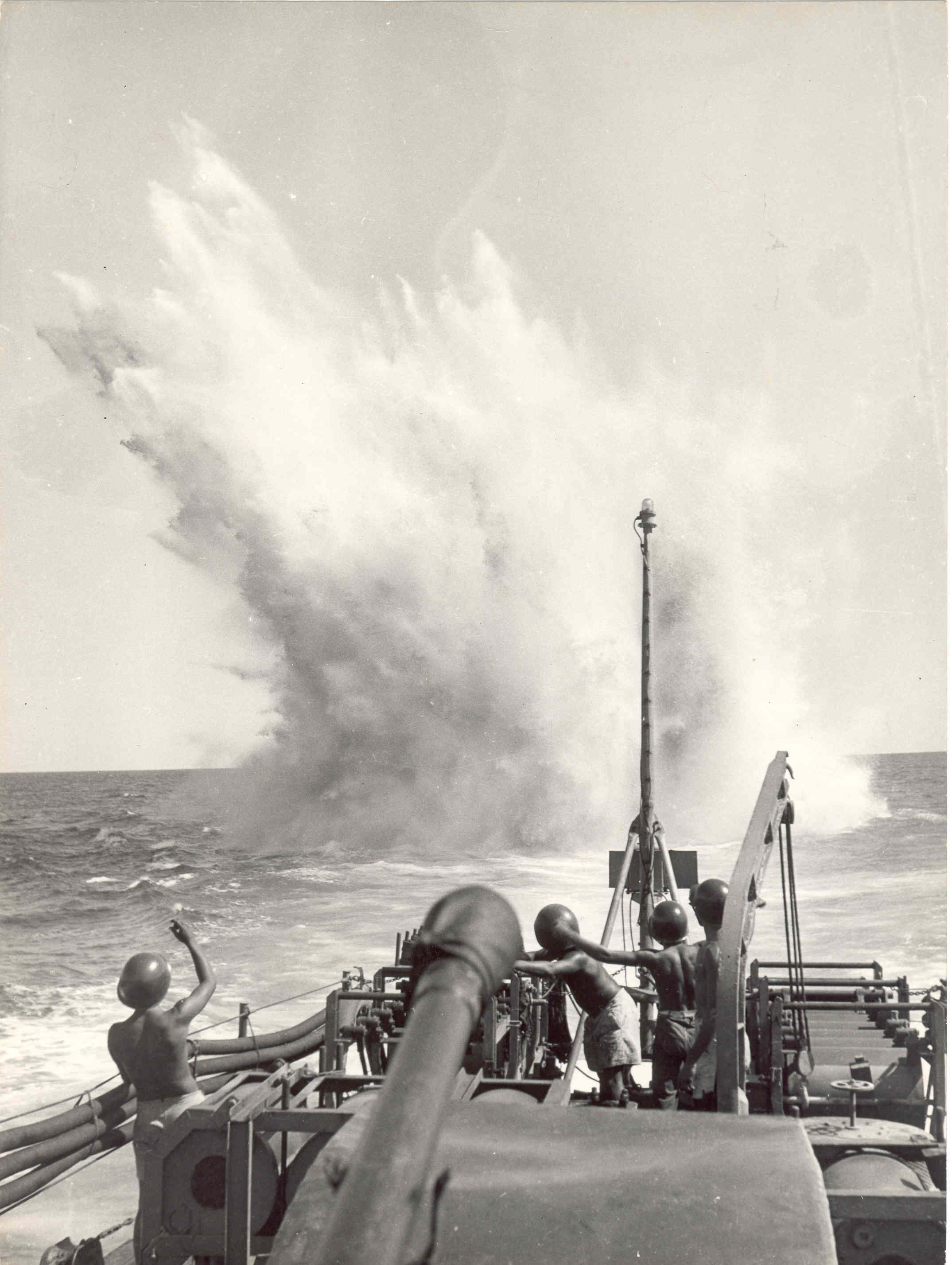 Arquivo liberado pela Marinha do Brasil através de projeto GLAM com Wiki Educação Brasil